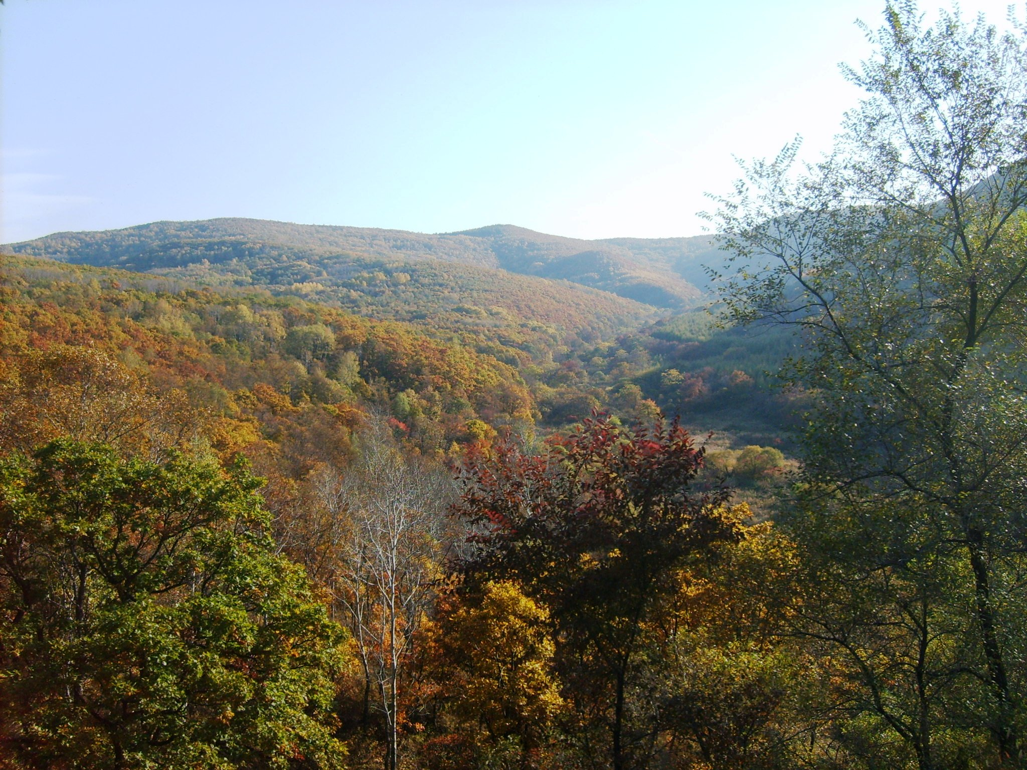 中文（中国大陆）: 滨绥铁路沿线绥芬河站附近的“五花山”景象